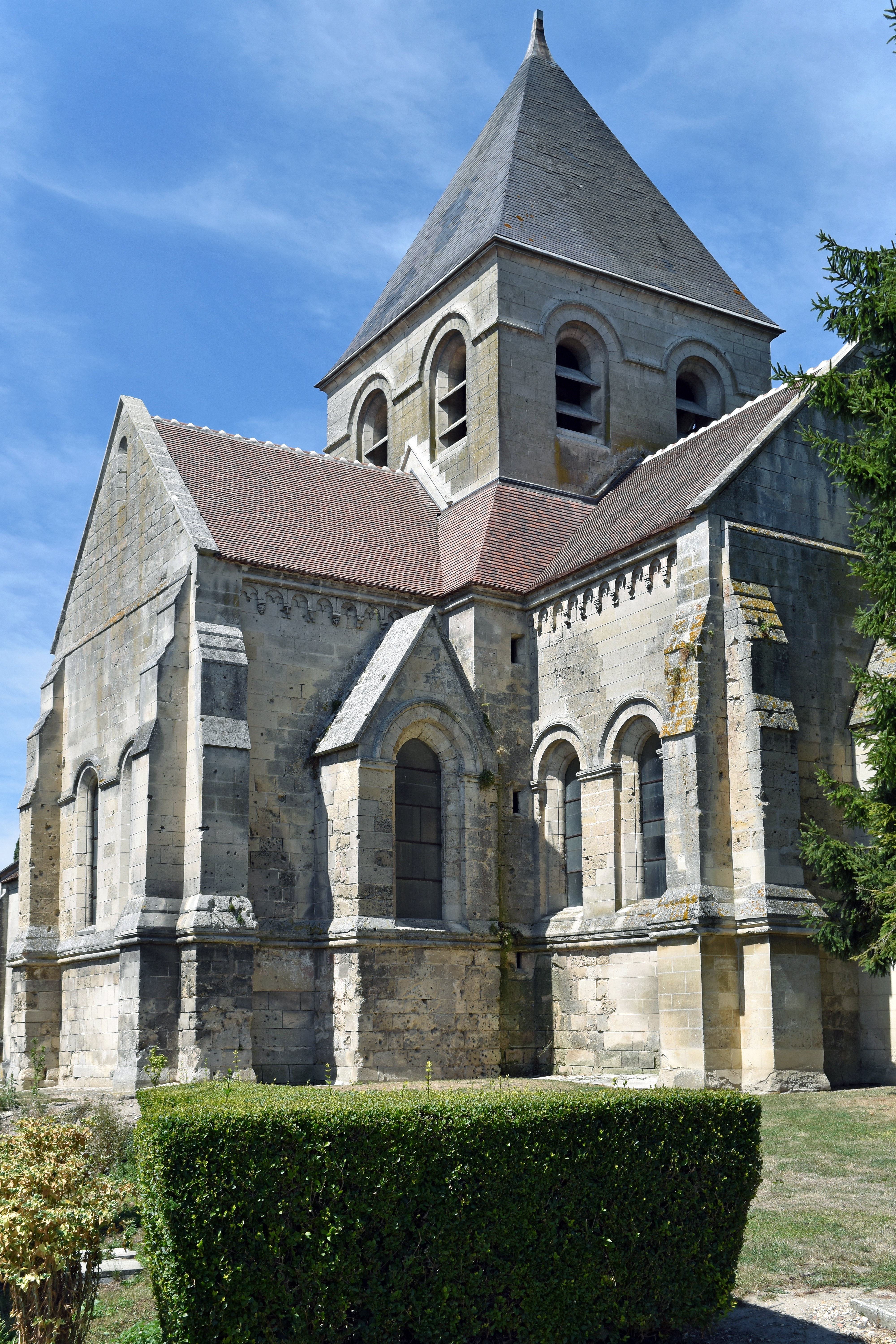 Eglise de Bazoches-sur-Vesles, Aisne France .